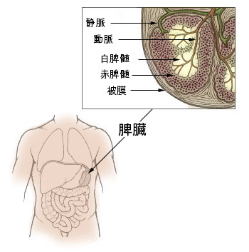 ==脾臓==